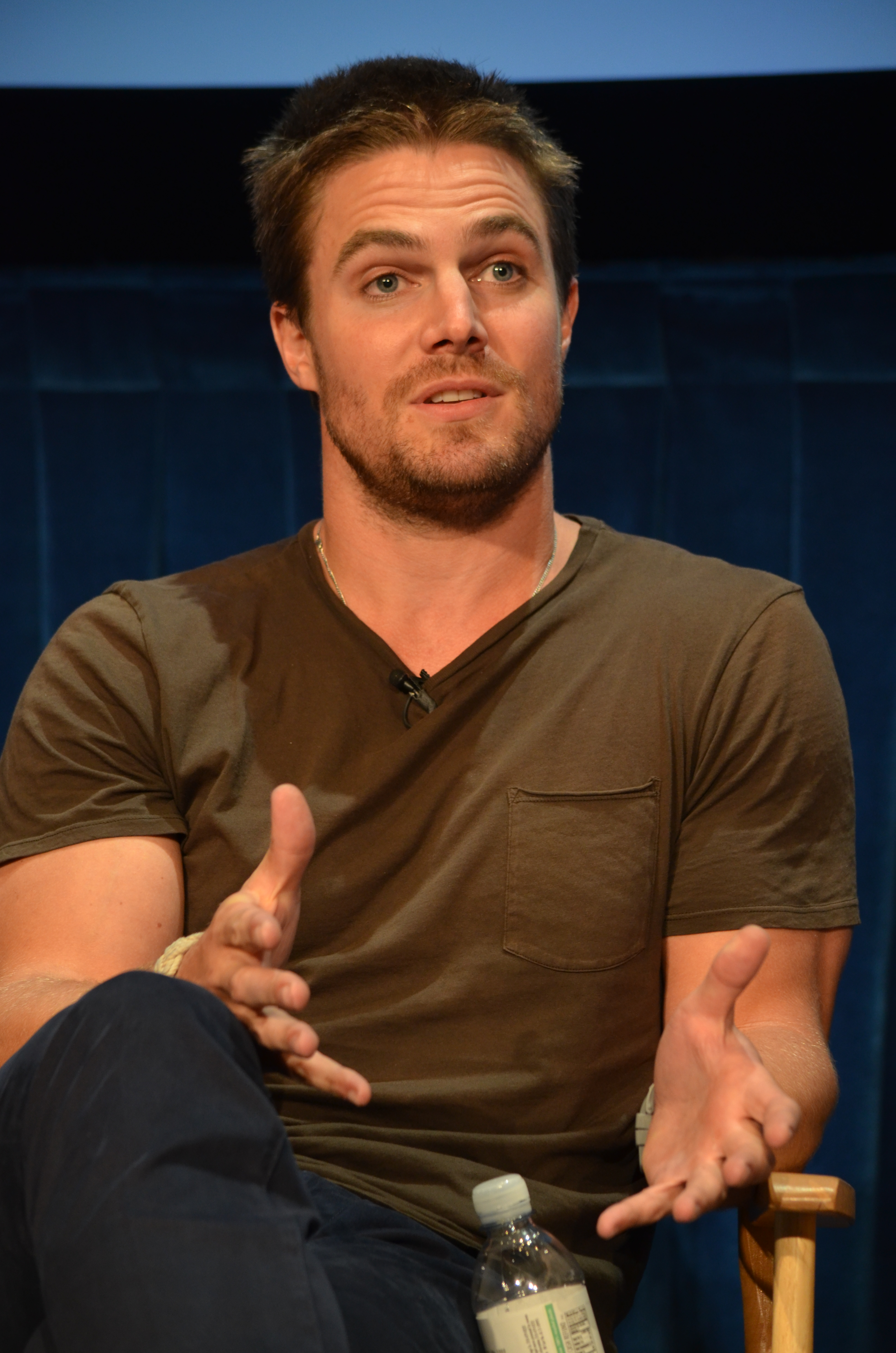 Stephen Amell